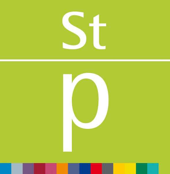 Logo des Staatspreises für Multimedia des österreichischen Bundesministeriums für Wirtschaft, Familie und Jugend